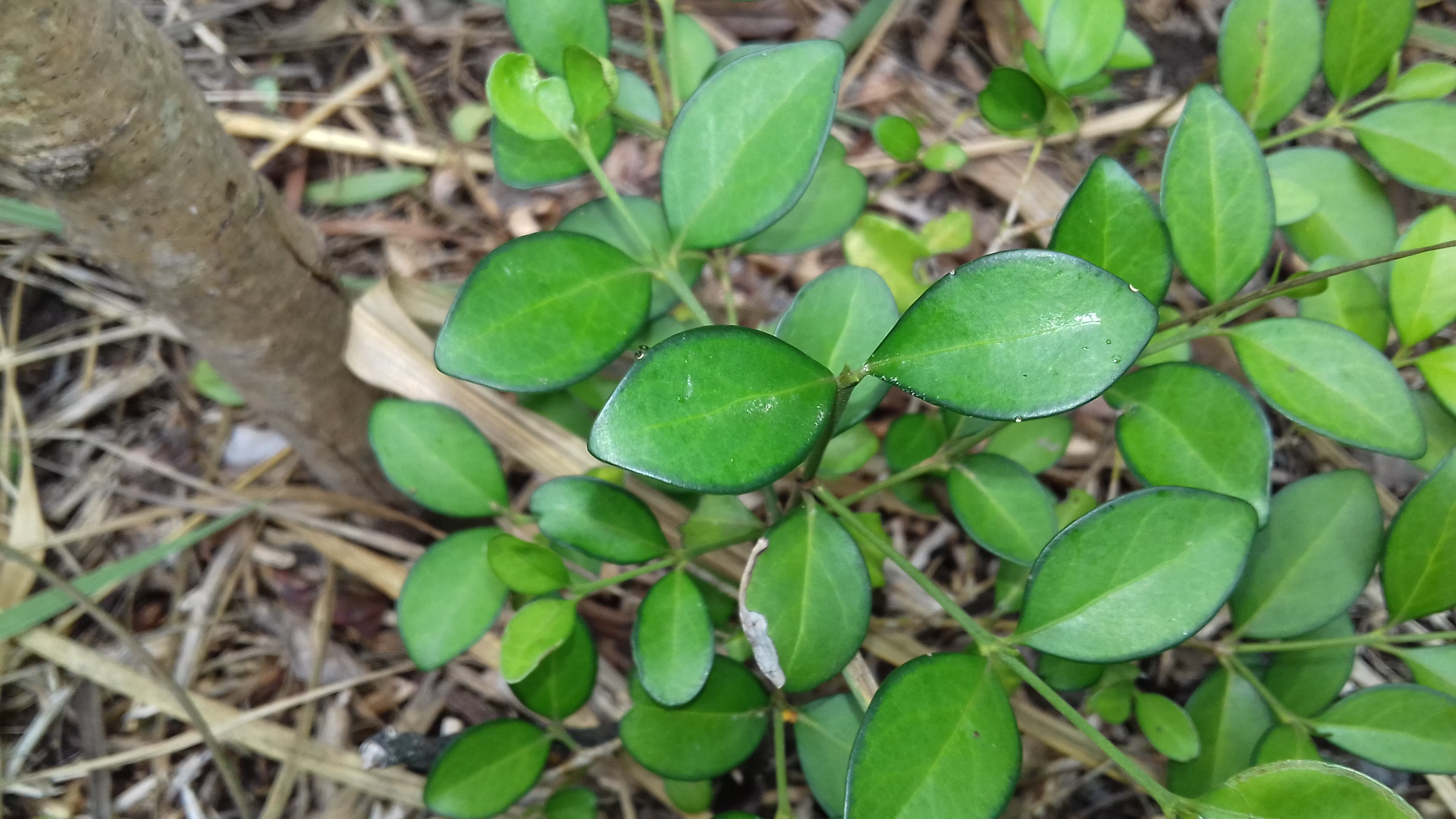 Feuilles de jeune Psydrax odorata, photographiées sur la colline du Ouen Toro, à Nouméa, en Nouvelle-Calédonie